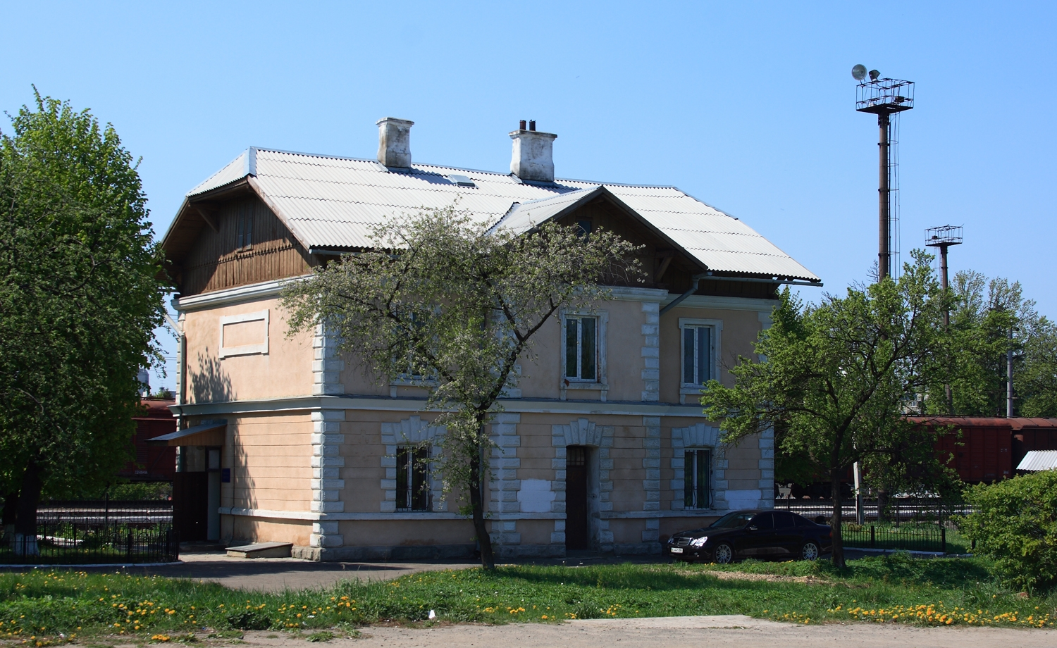 Здание станции Сихов во Львове